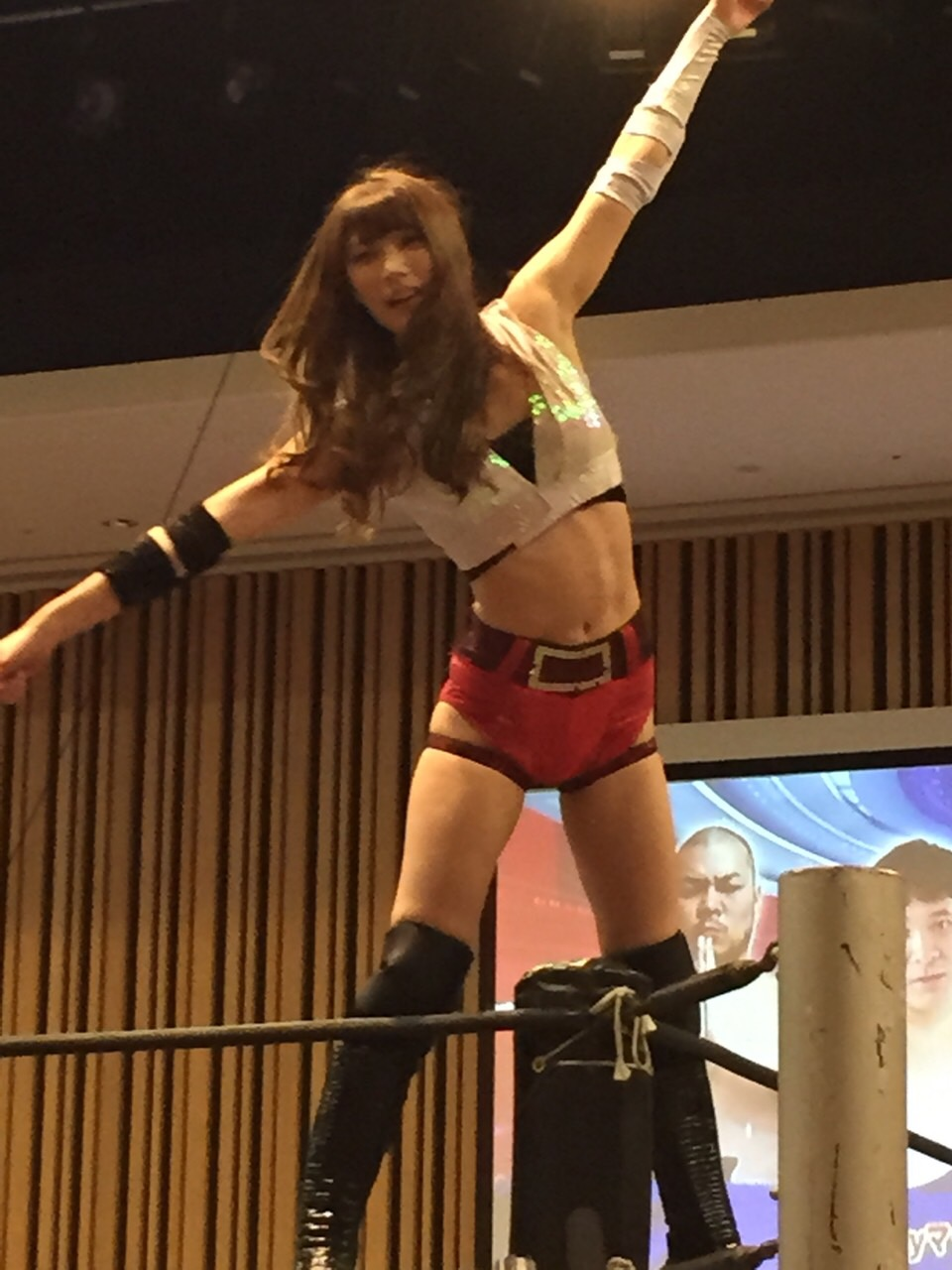 2015年、埼玉にて